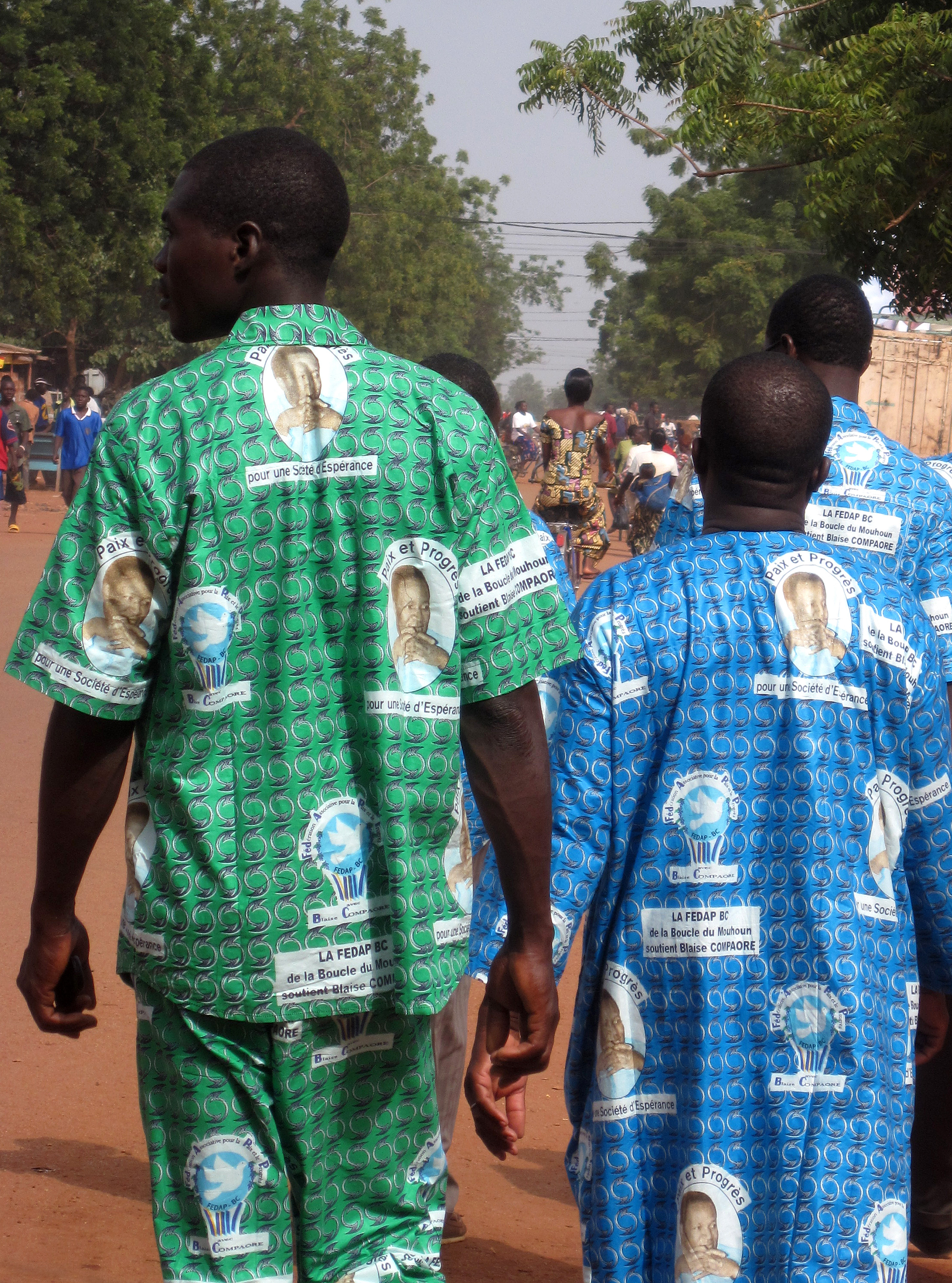 Élection présidentielle du Burkina Faso en 2010. Sympathisants du Président Blaise Compaoré. This is an image of Cultural Fashion or Adornment from Burkina Faso